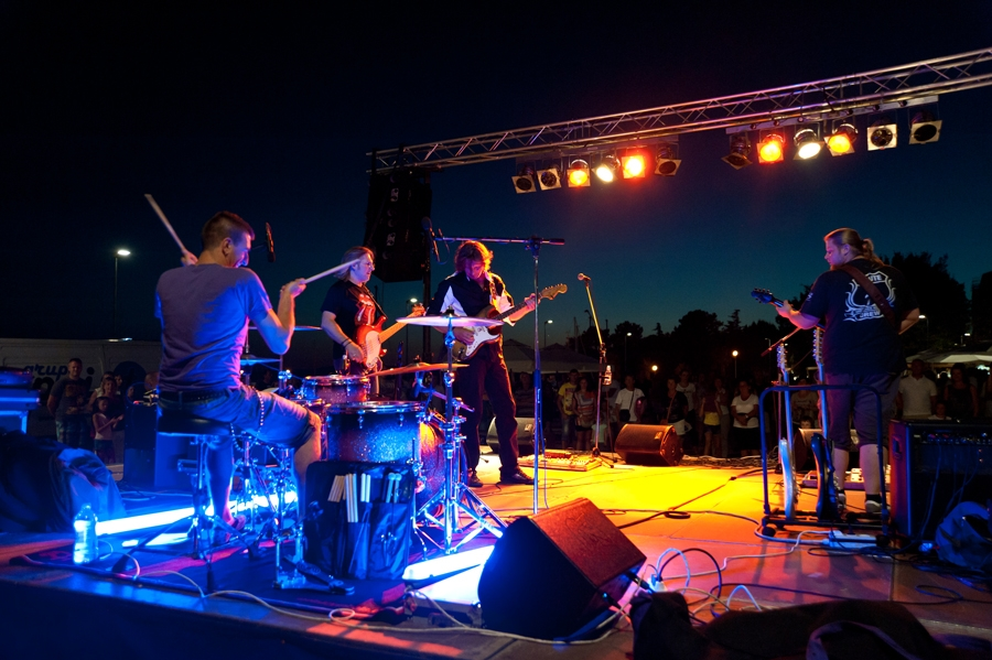 Aerodrom Aerodrom